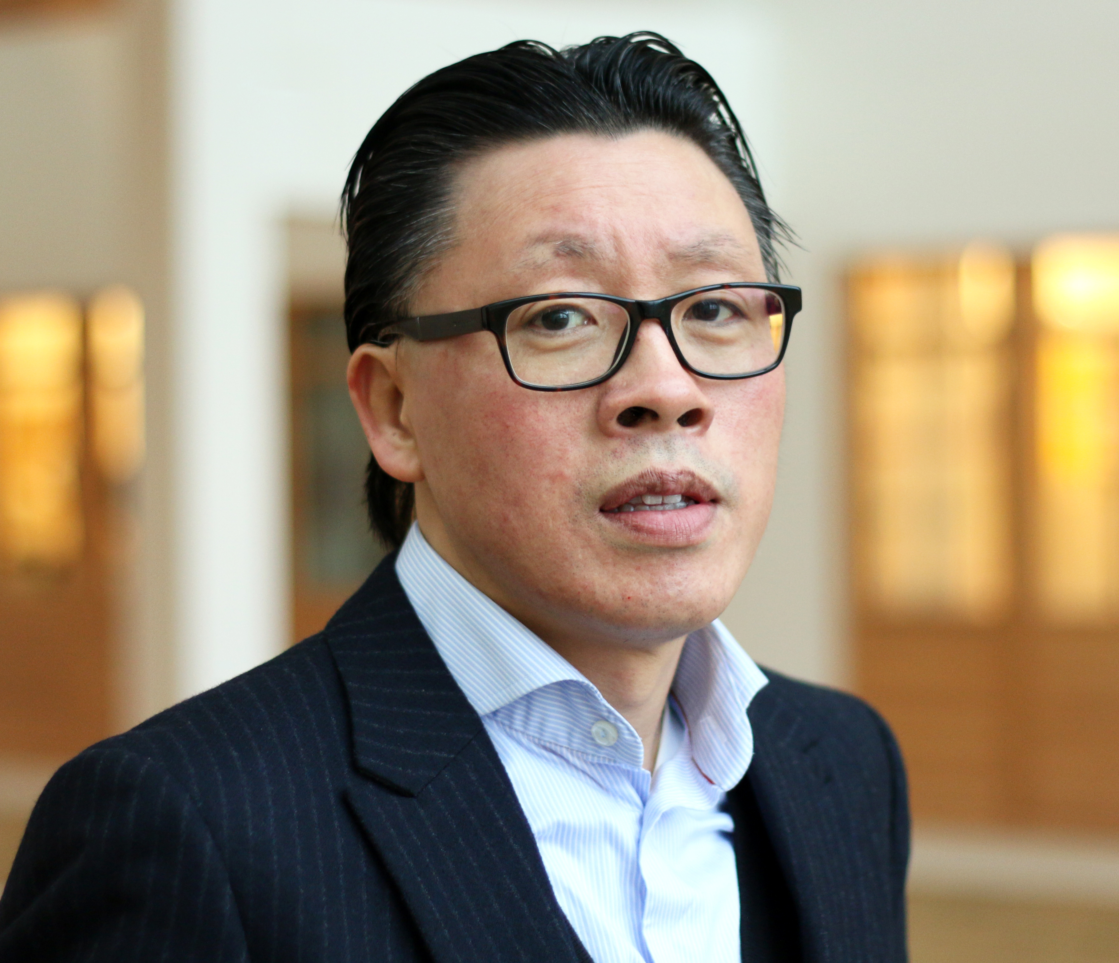 Tobias Hübinette, lektor i svenska som andraspråk och i interkulturella studier vid Kulturvetenskapliga forskargruppen, KuFo.